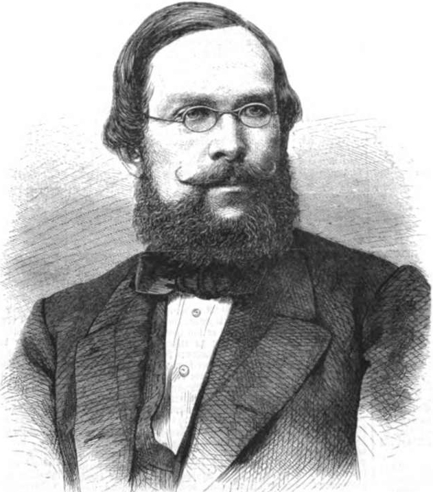 August Petermann, deutscher Geograph im 19. Jh.